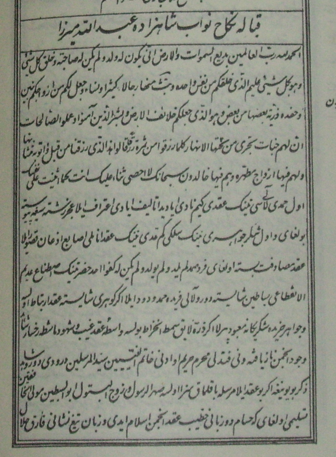 تۆرکجه: قباله نکاح نواب شاهزاده آزاده عبدالله ميرزا